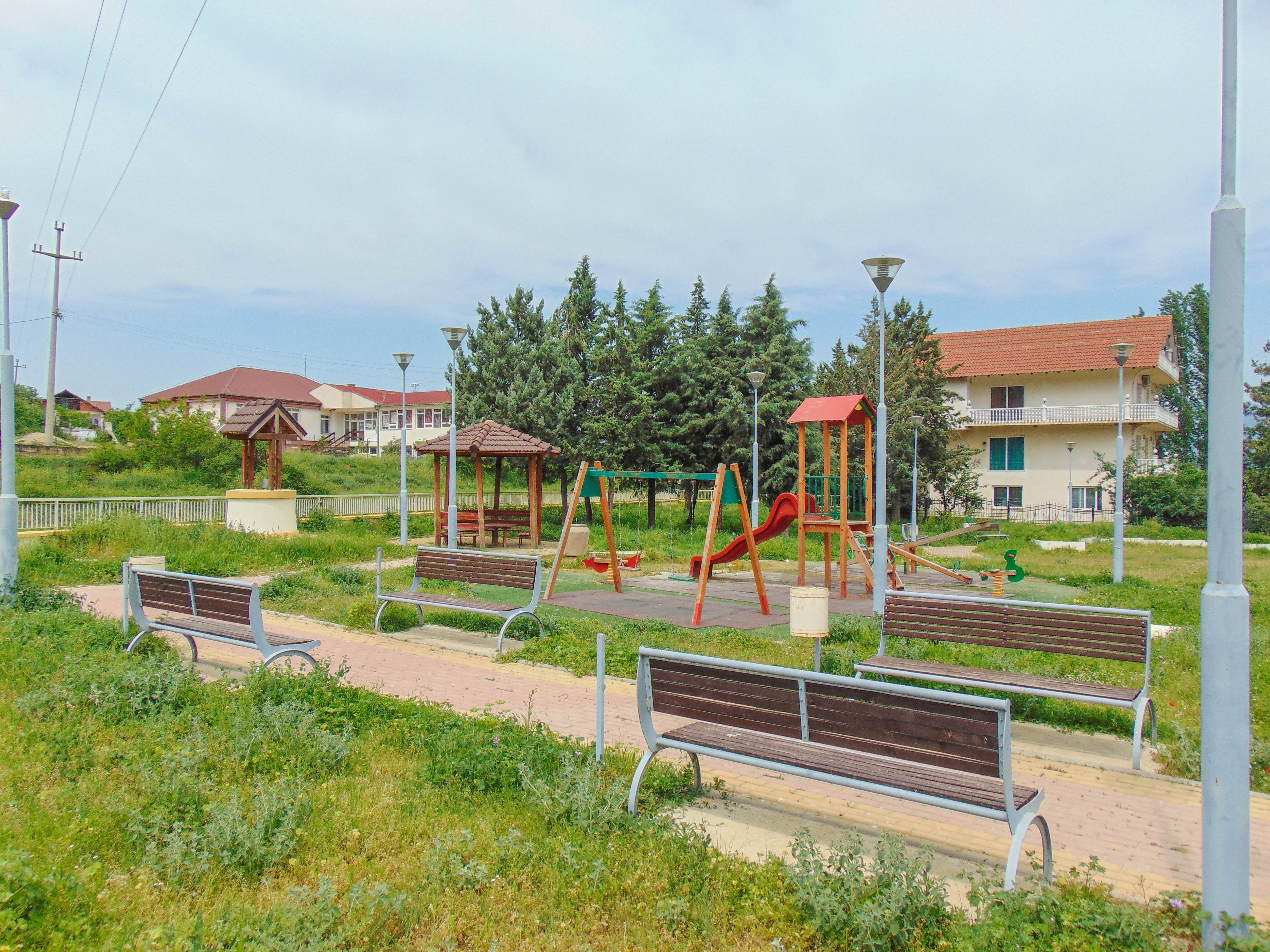 Калуѓерица - Општина Радовиш